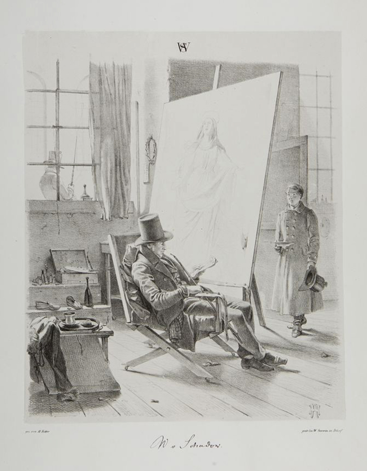 Friedrich Wilhelm von Schadow in seinem Atelier, "Auferstehung der Maria" malend, Illustration von Henry Ritter in Schattenseiten der Düsseldorfer Maler, 1845